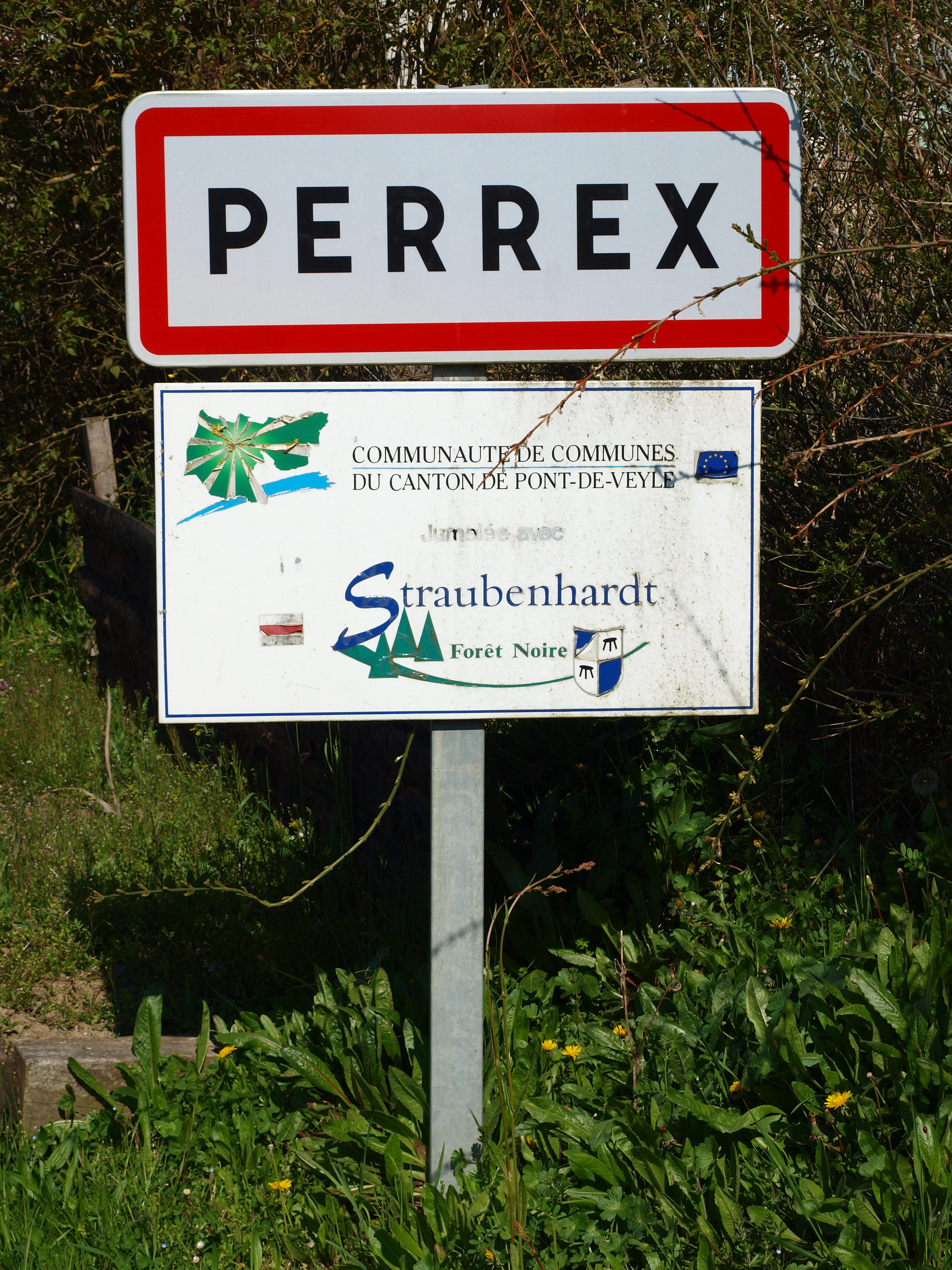 Perrex (Ain, France)